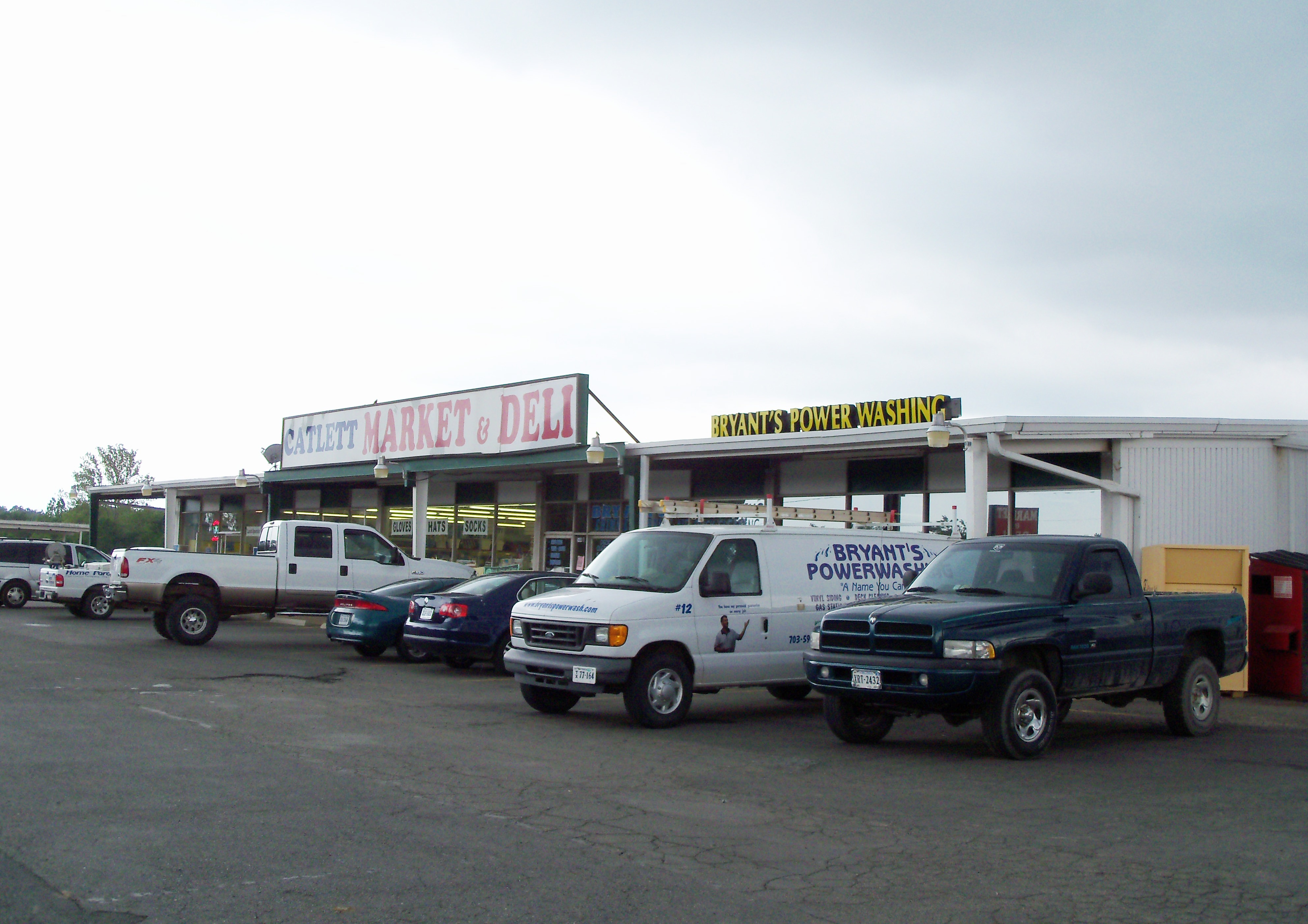 Catlett, VA 20119, USA